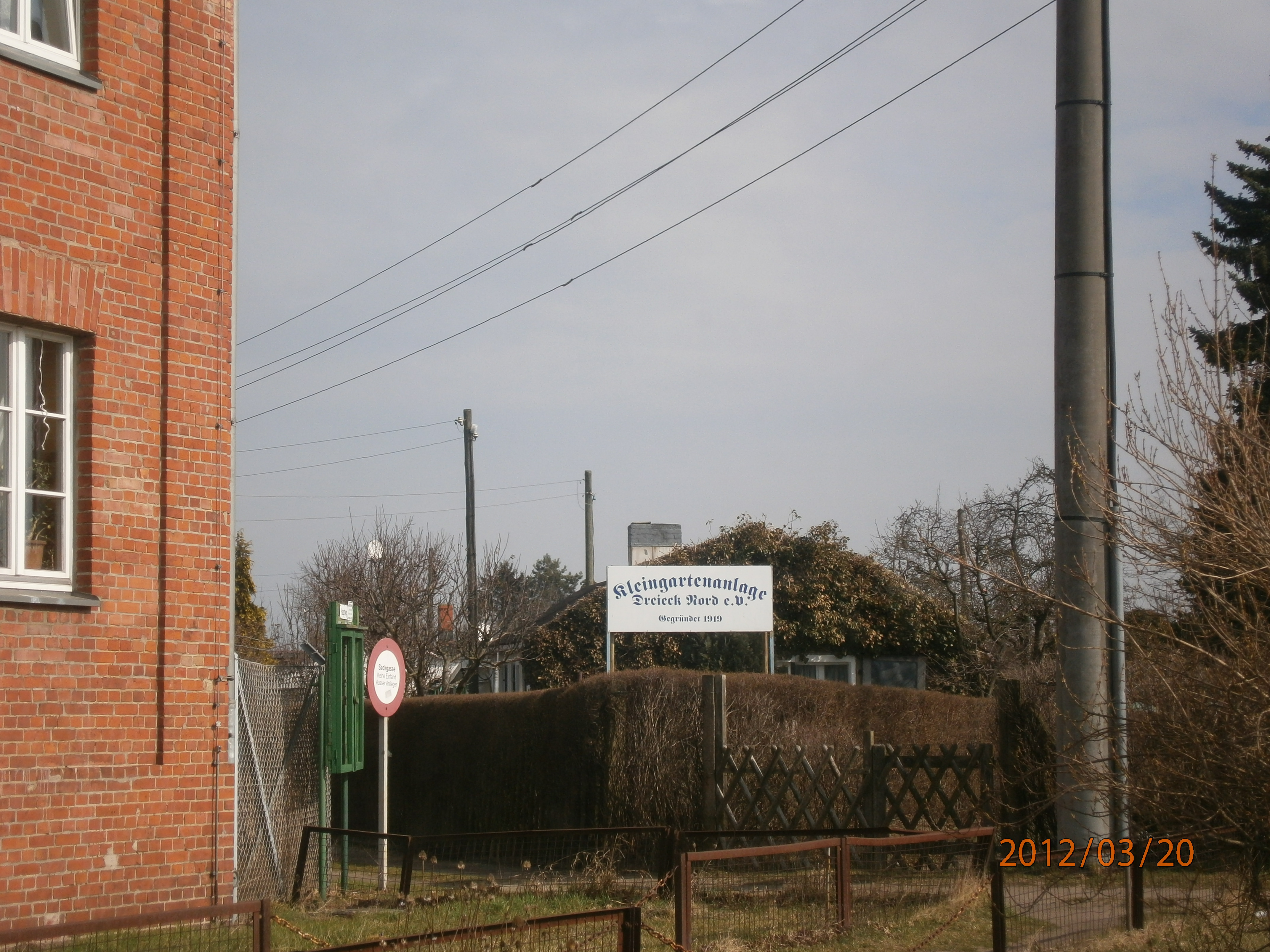 Eingang zur Kleingartenanlage Dreieck Nord e.V. in Berlin-Heinersdorf, von der Ecke Asgard-/ Romain-Rolland-Straße und Frithjofstraße.